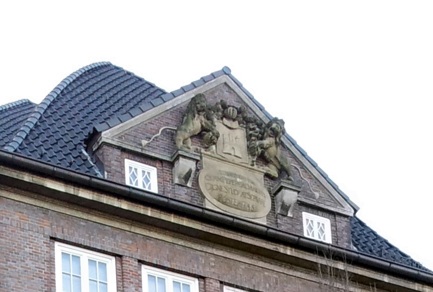 Giebel des Hamburgmuseums mit Inschrift vom Deichtor: Libertatem quam perperere